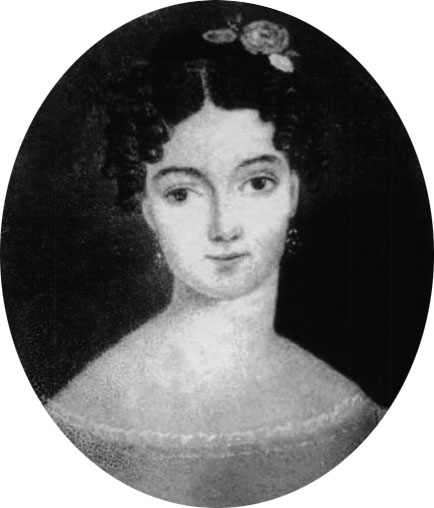 Retrato de Constanza Nordenflycht (1808-1837), madre de los tres hijos del político chileno de la primera mitad del siglo XIX Diego Portales